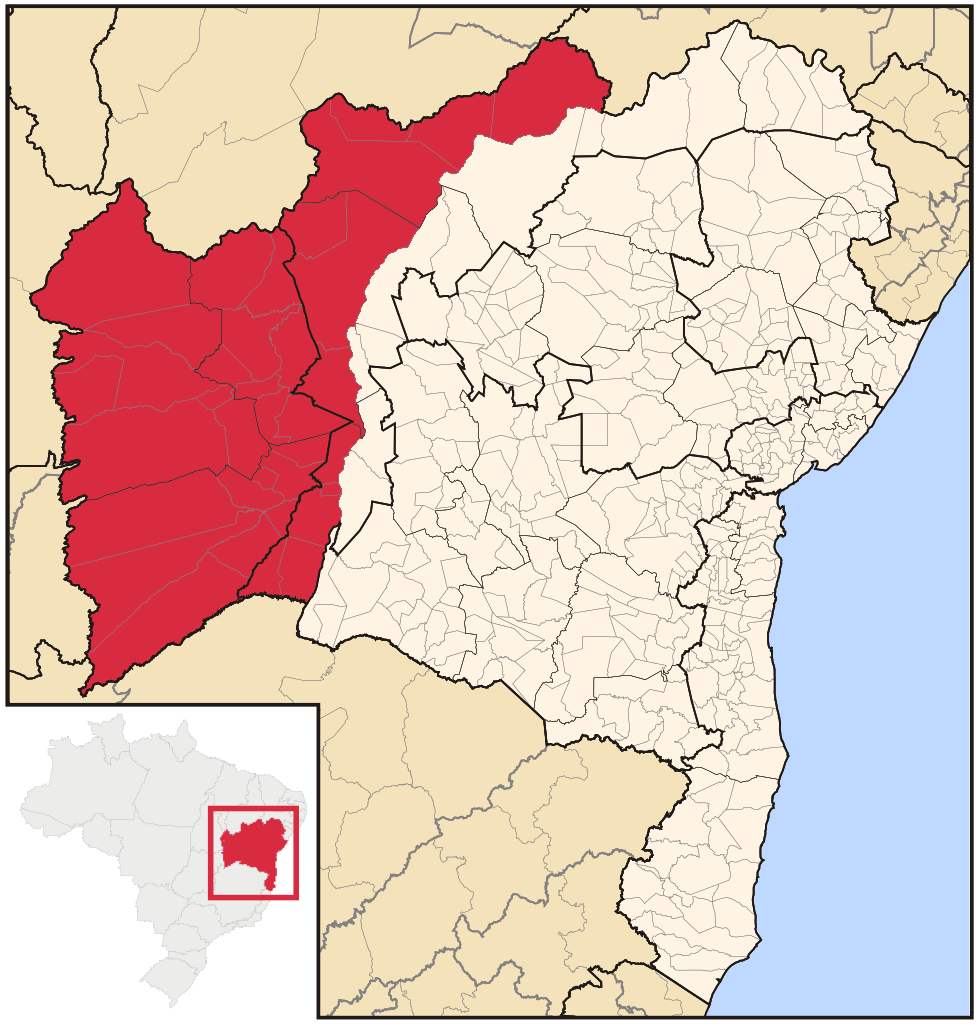 Área da proposta de unidade federativa do Rio São Francisco.